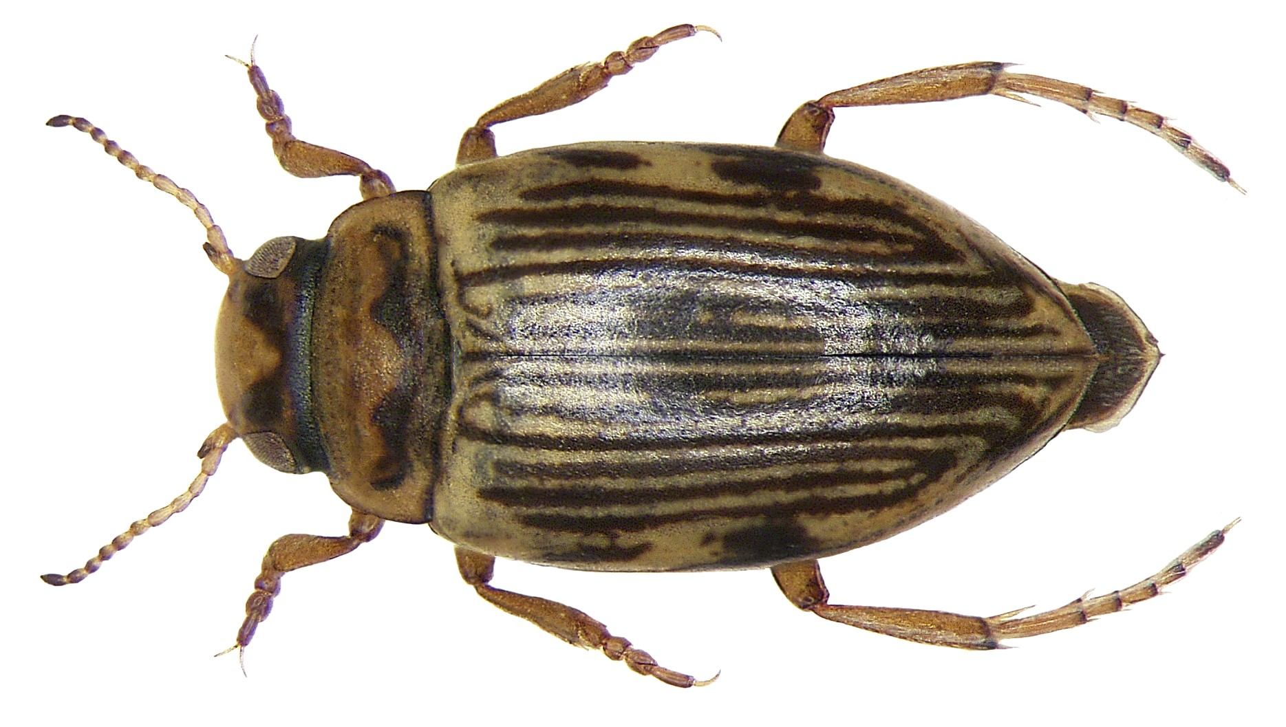 Oreodytes davisii (Curtis, 1831) borealis auct. nec (Gyllenhal, 1827 Familie: Dytiscidae Größe: 4,0-4,5 mm Verbreitung: Europa Ökologie: in kalten Bächen in höheren Gebirgslagen Fundort: Austria, Mariapfarr, Schladminger Tauern, 1500 m leg.det. U.Schmidt, 1984 Foto: U.Schmidt, 2008